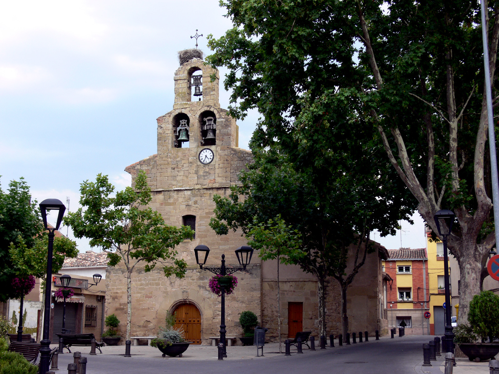 Iglesia de San Cosme y San Damián en Varea, Logroño (La Rioja - España).